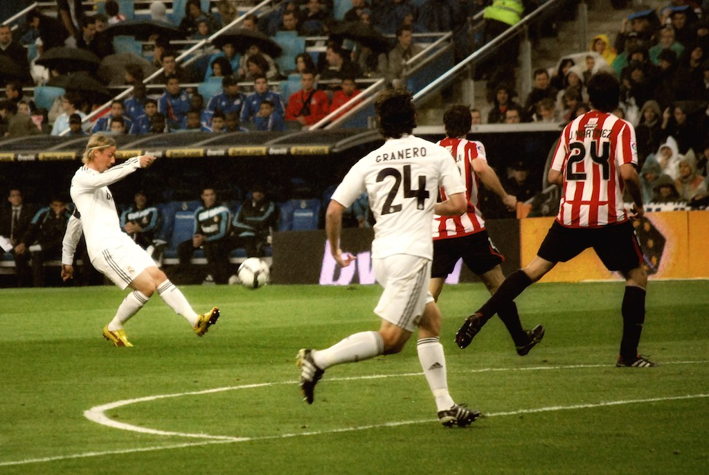 Un pase de Guti, frente al Athletic de Bilbao.